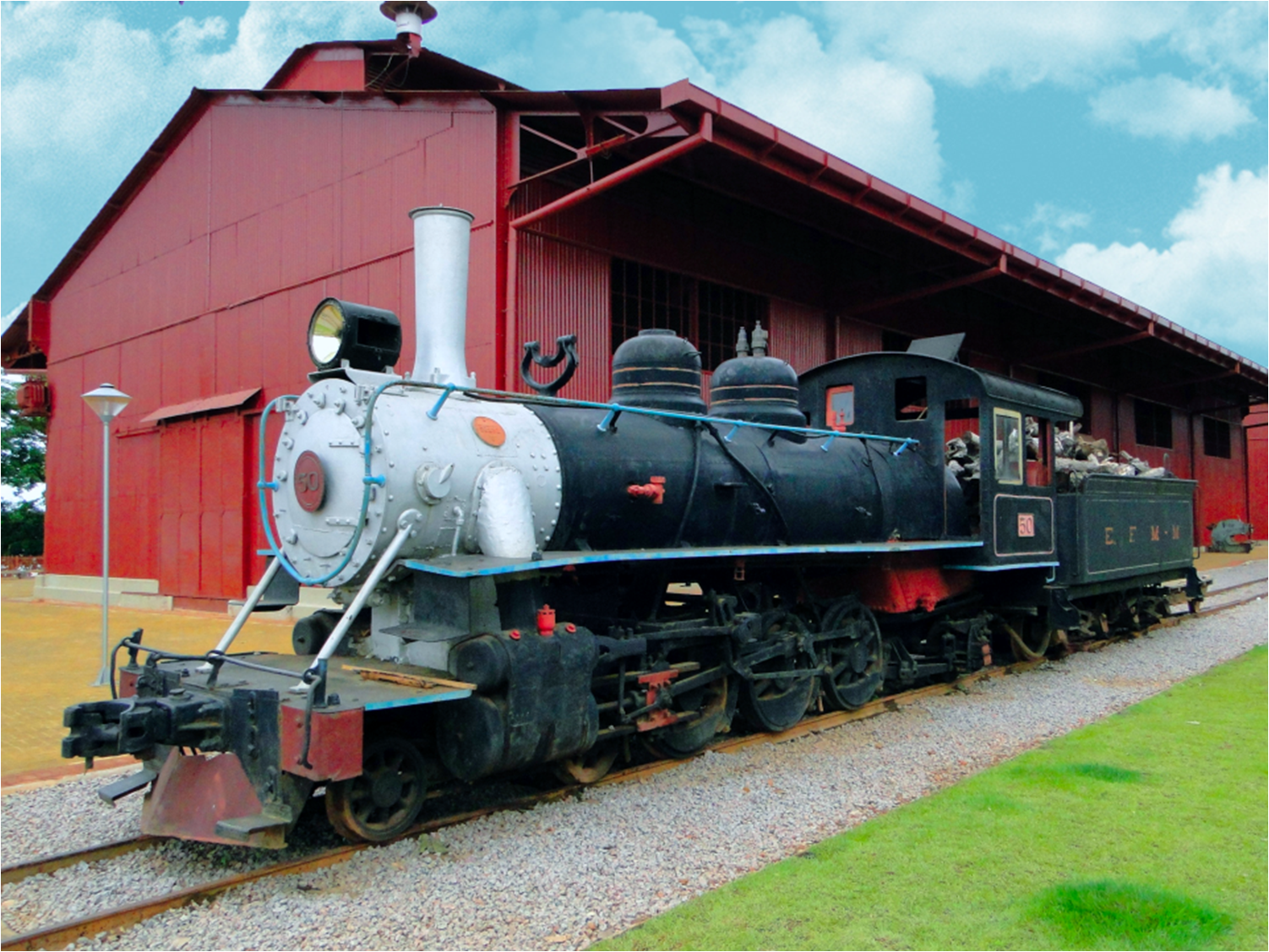 Locomotiva no pátio da Estrada de Ferro Madeira Mamoré - Porto Velho - Rondônia